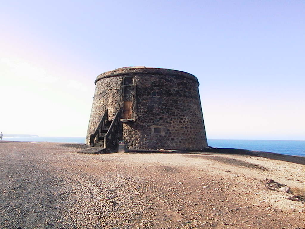 Castillo del Cotillo, in La Oliva, Fuerteventura, Canary Islands